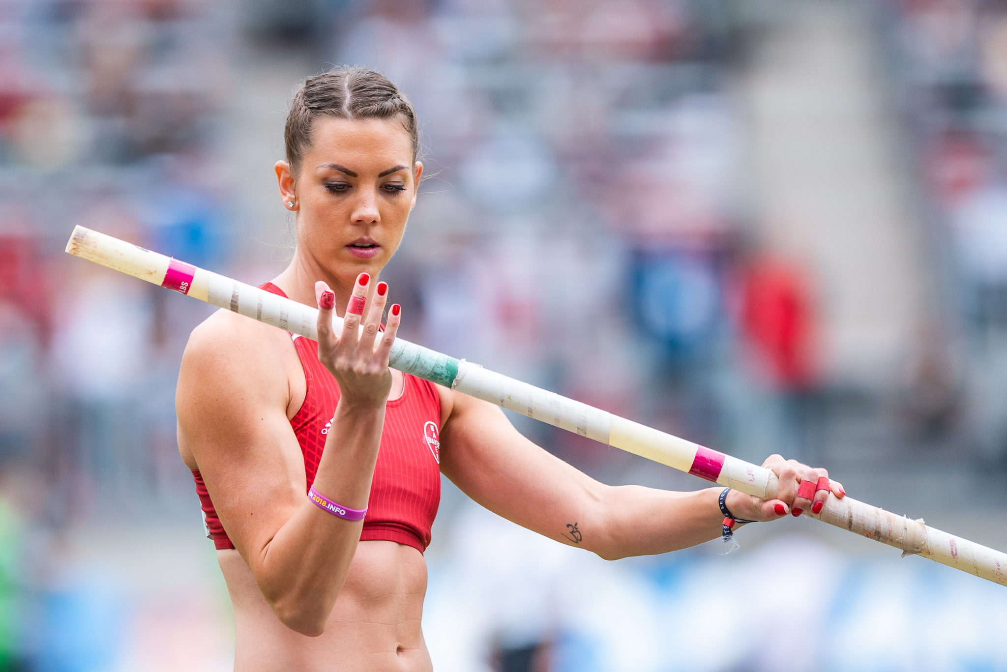 DLV,Deutsche Leichtathletik Meisterschaften 2018,Deutscher Leichtathletik-Verband,Katharina Bauer,Max-Morlock-Stadion,Pole vault,Stabhochsprung,TSV Bayer 04 Leverkusen